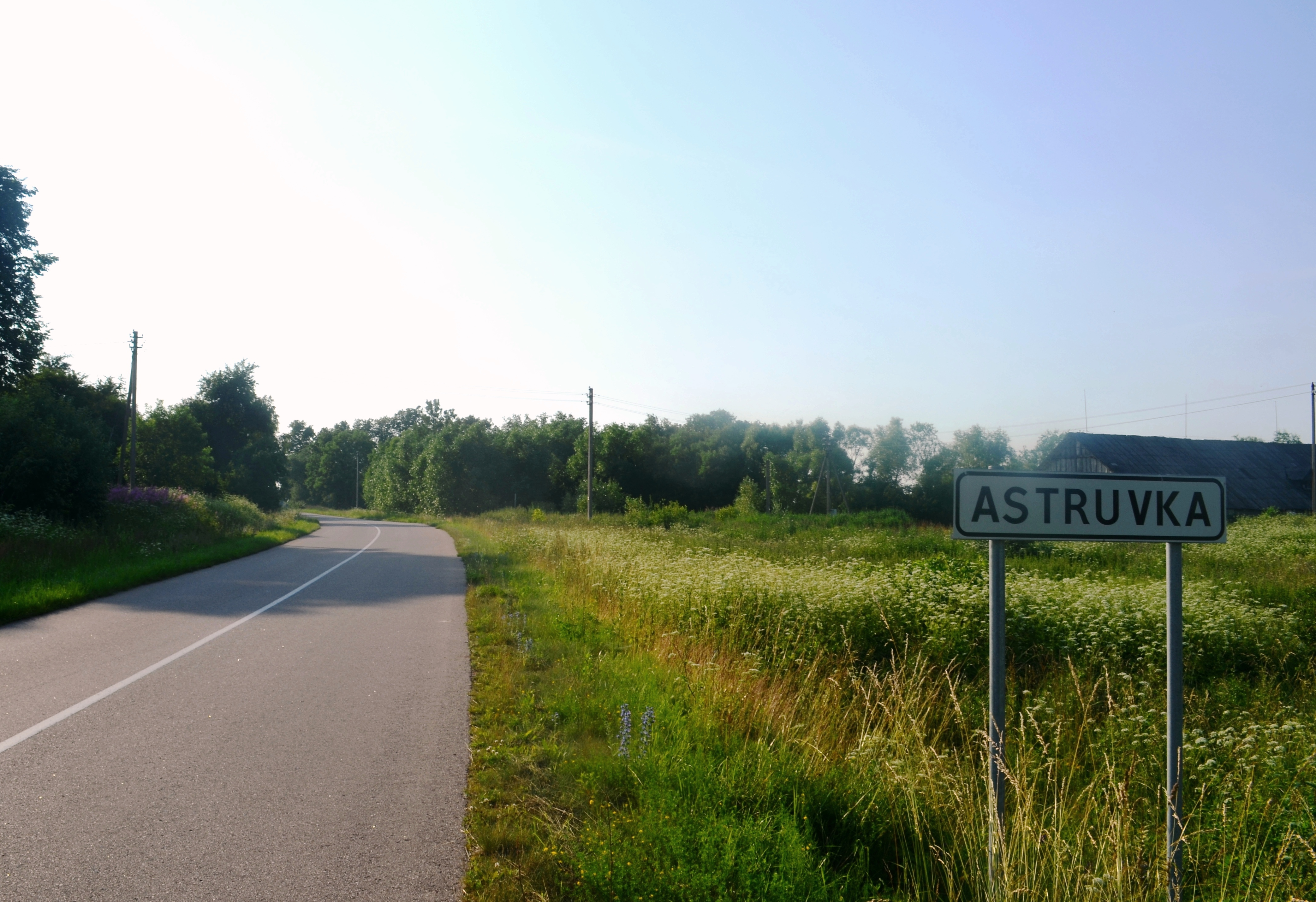 Astruvka, Širvintų raj.